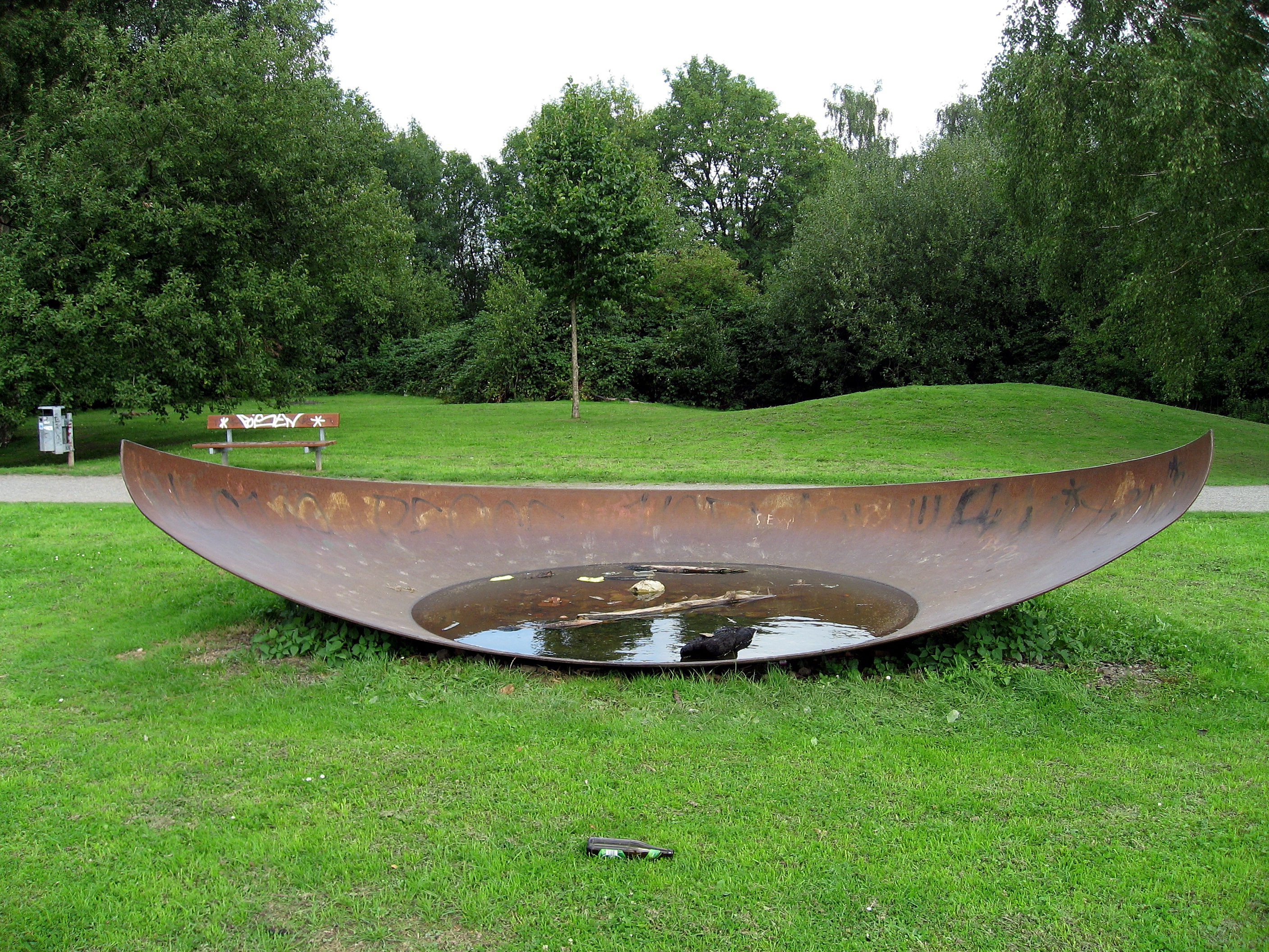 Dortmund-Tremonia-Park-Eisenform